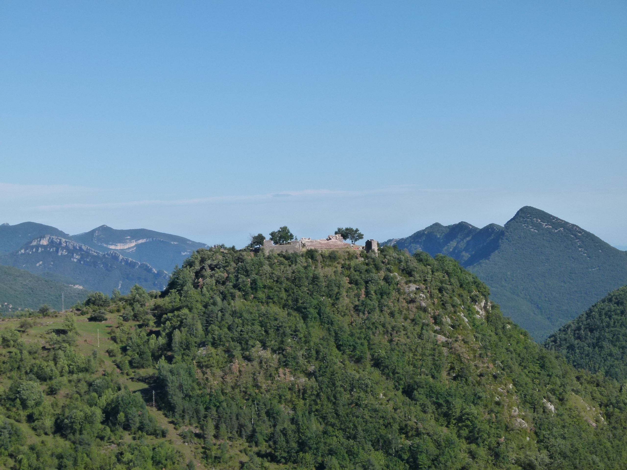 Castell de Rocabruna (Camprodon)